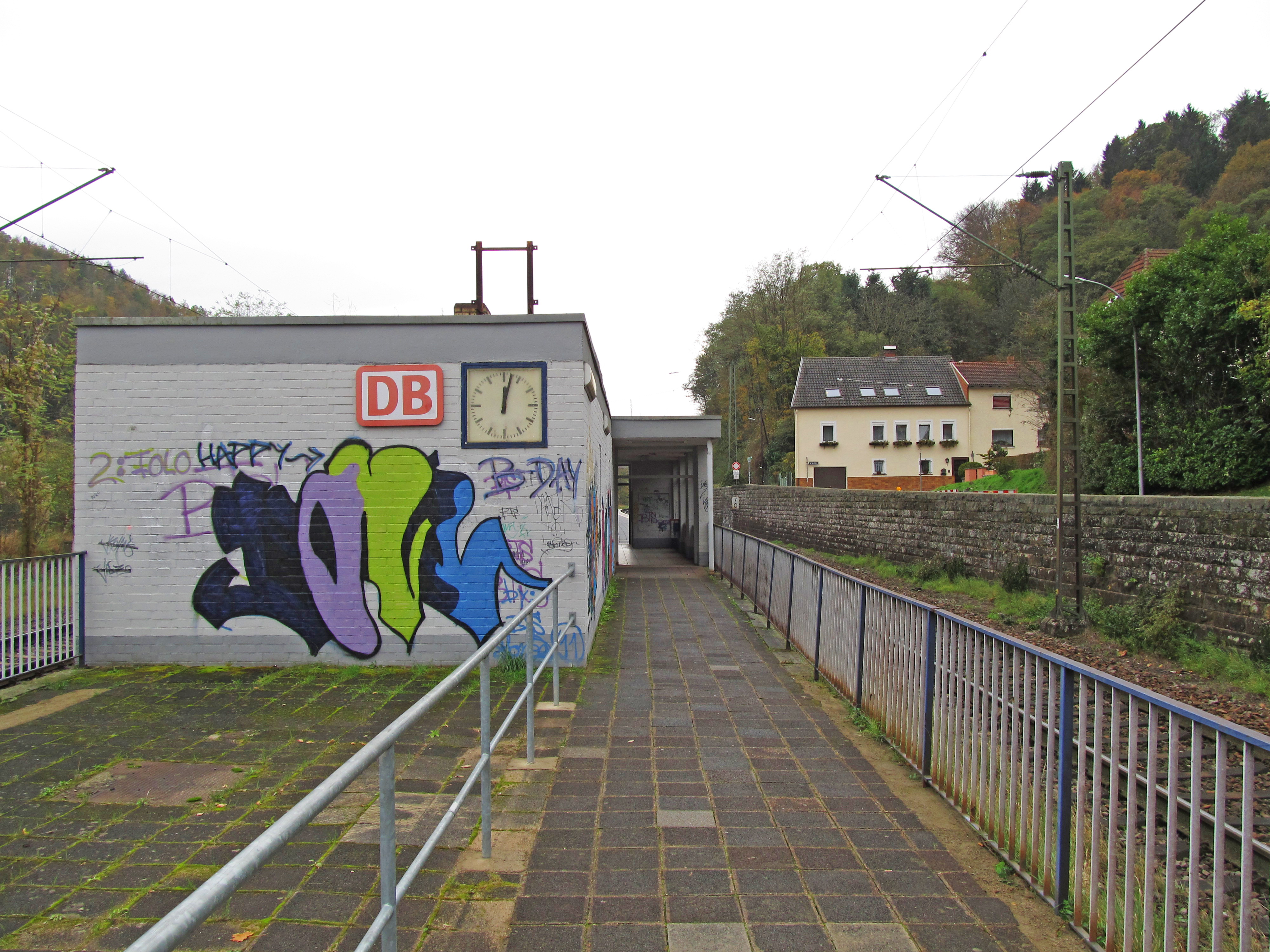 Bahnhof Scheidt, Saarbrücken, Saarland